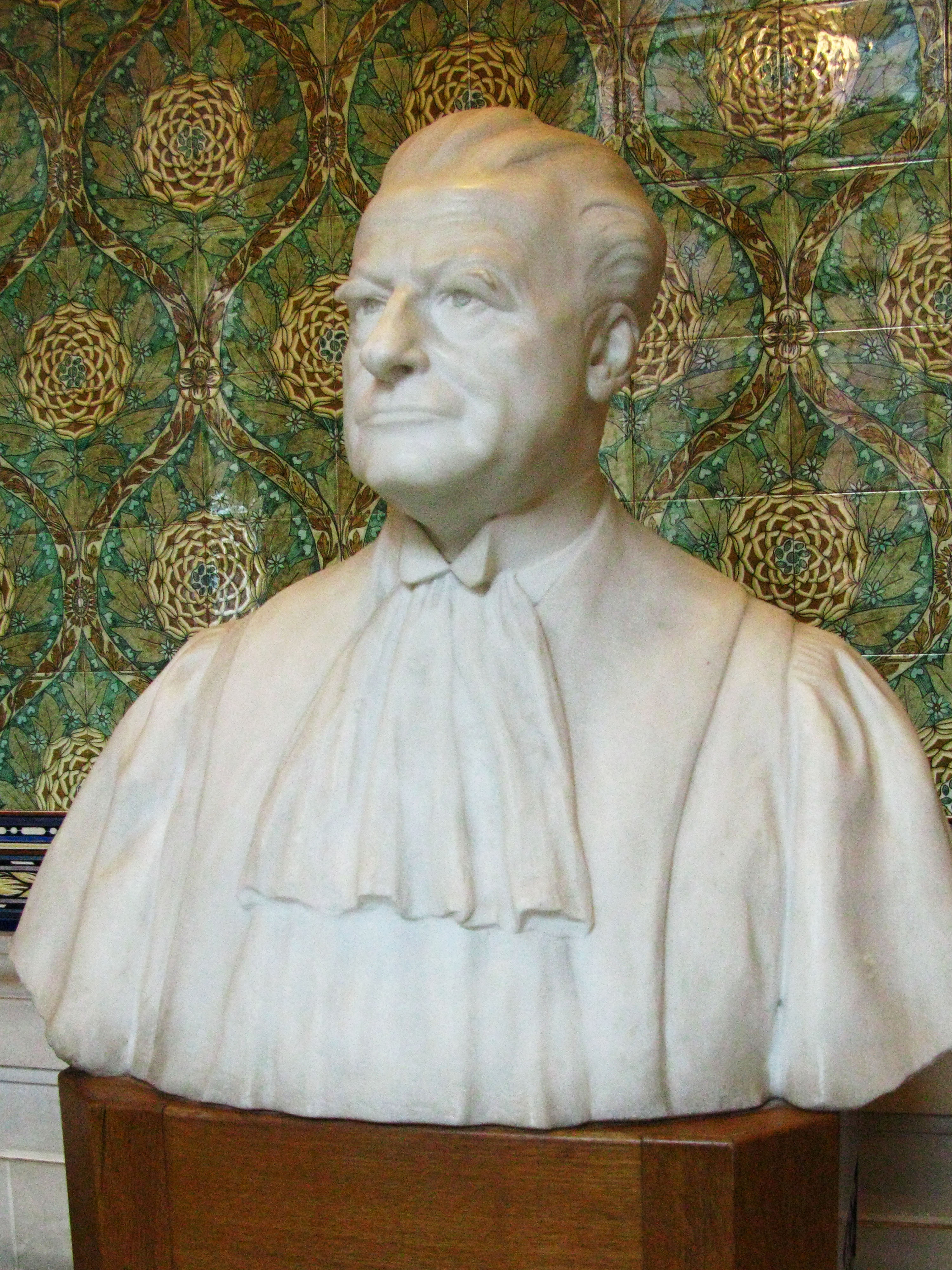 Buste de Bernard Loder se trouvant dans le Palais de la Paix Peace Palace Den Haag The Hague La Haye